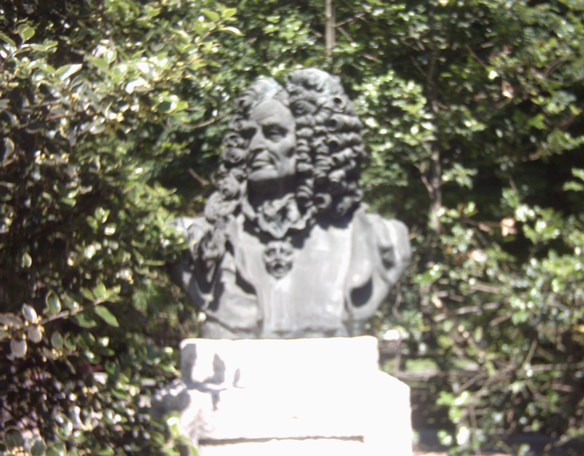 Busto dedicado a Álvaro Navia Osorio y Vigil, tercer Marqués de Santa Cruz de Marcenado, situado en el Parque San Francisco de Oviedo, Asturias.